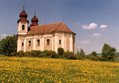 Kostel Sv. Markéty v Šonově, okres Náchod